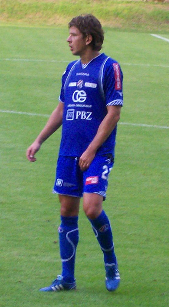 Dino Drpič